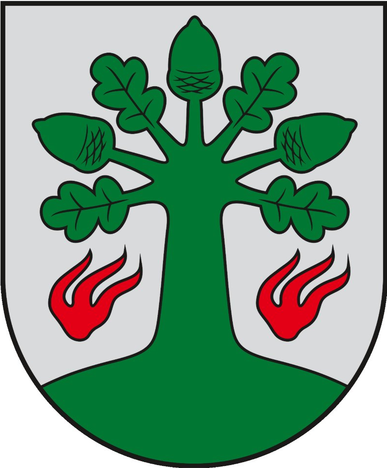 Upynos herbas